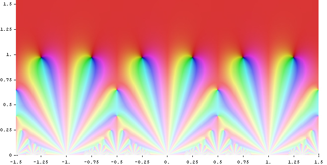 Eisenstein series G_12